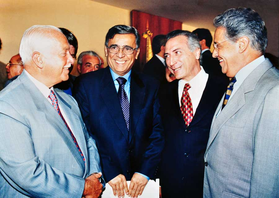 ACM, Élcio Alvares, Michel Temer e Fernando Henrique Cardoso durante a gestão tucana.